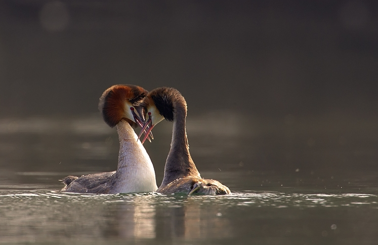 Podiceps cristatus - pair; Tovačov, Poděbrady, Chomoutov, CZ